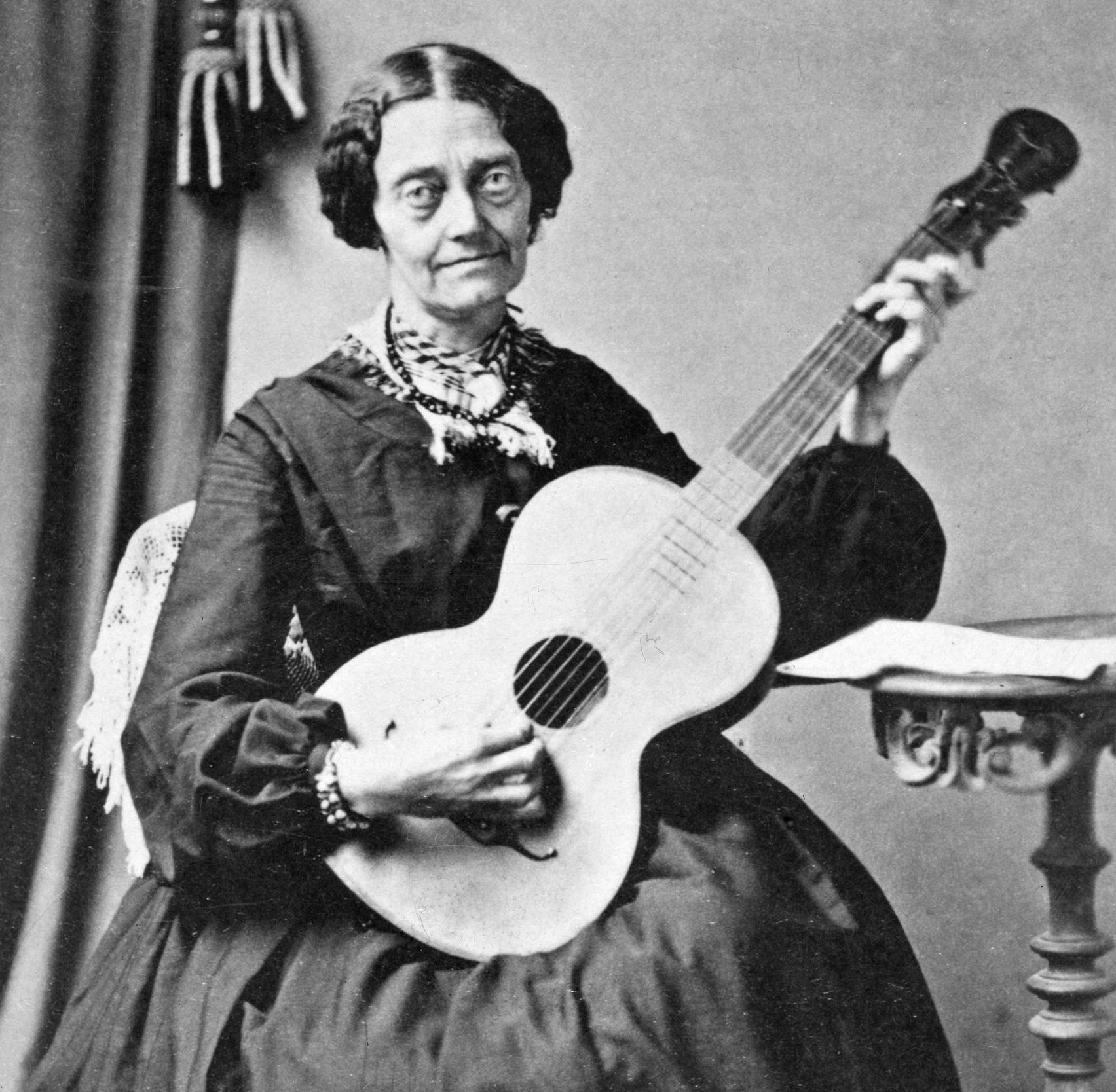 Josabeth Sjöberg 1812-1882